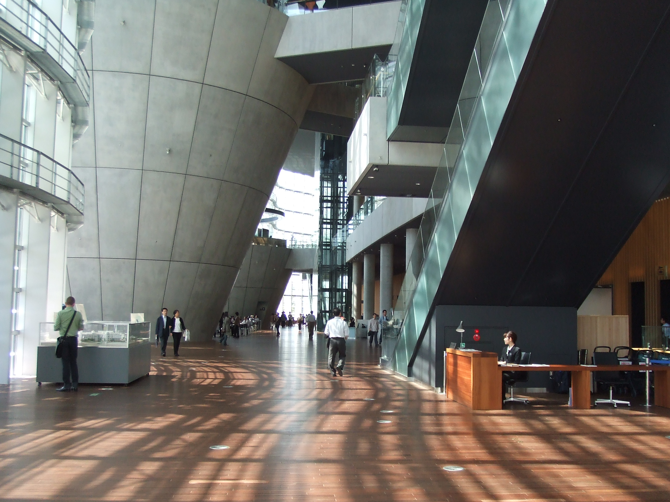 国立新美術館 館内の様子